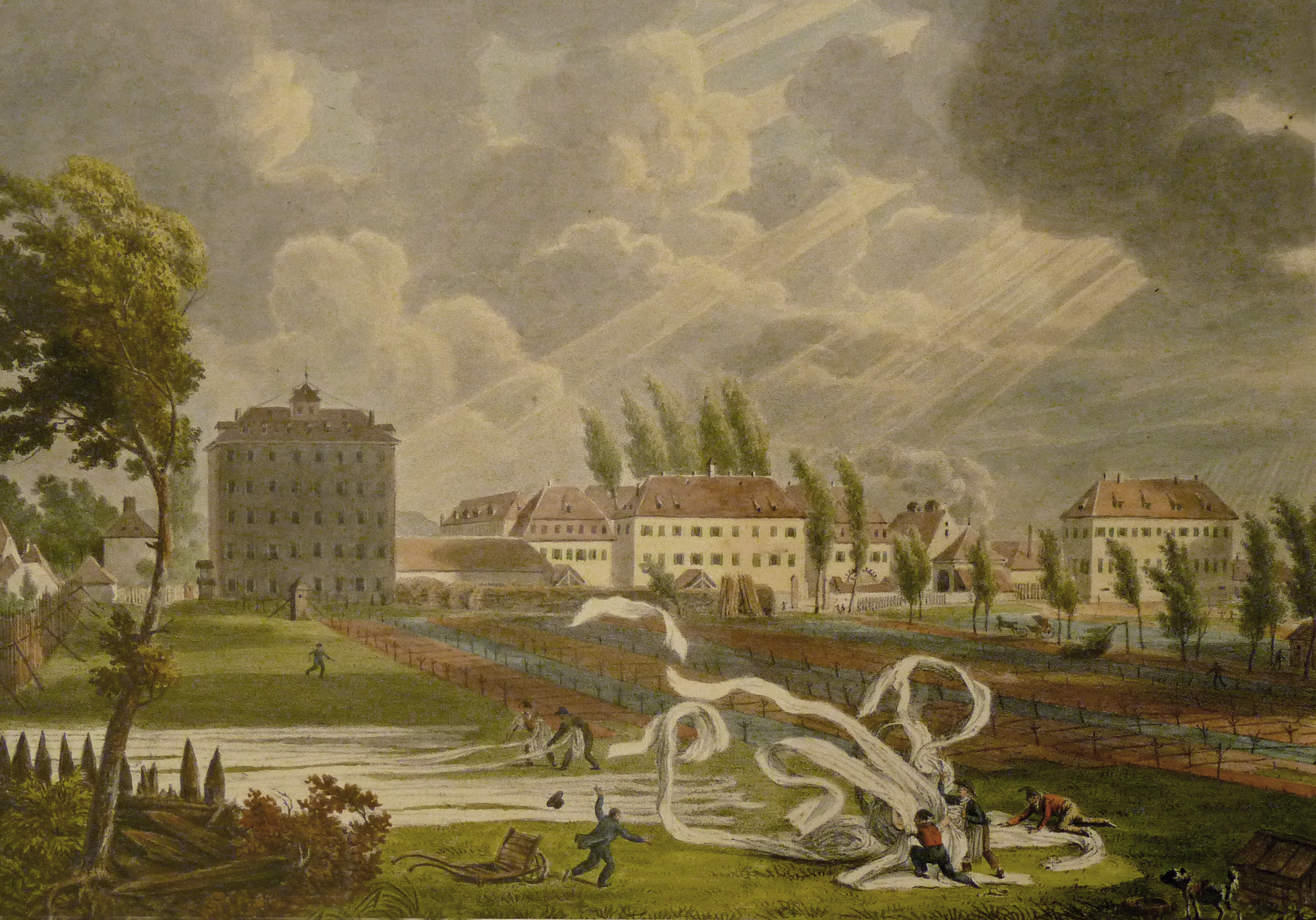 Jean Mieg, Fabrique d'indiennes et filature de Mrs Haussmann Frères à Logelbach, lithographie aquarellée, in Manufactures du Haut-Rhin, 1822-1825, pl. 12. Musée historique de Mulhouse.